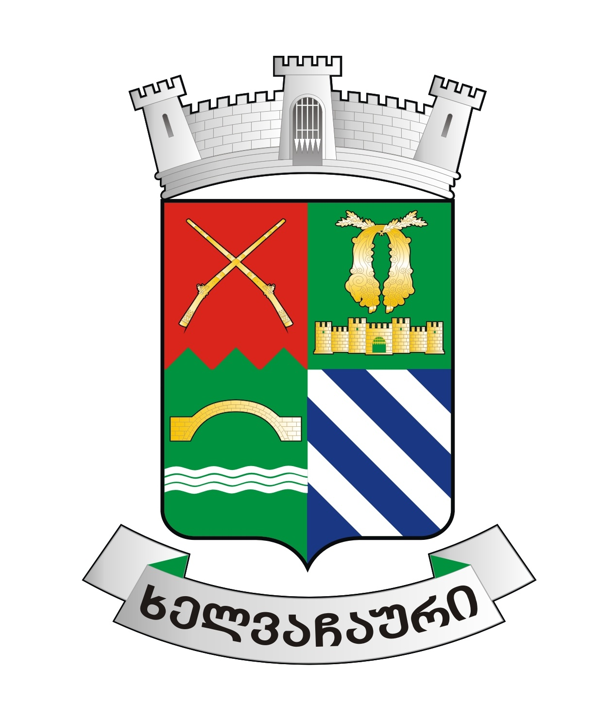 ხელვაჩაურის მუნიციპალიტეტის გერბი